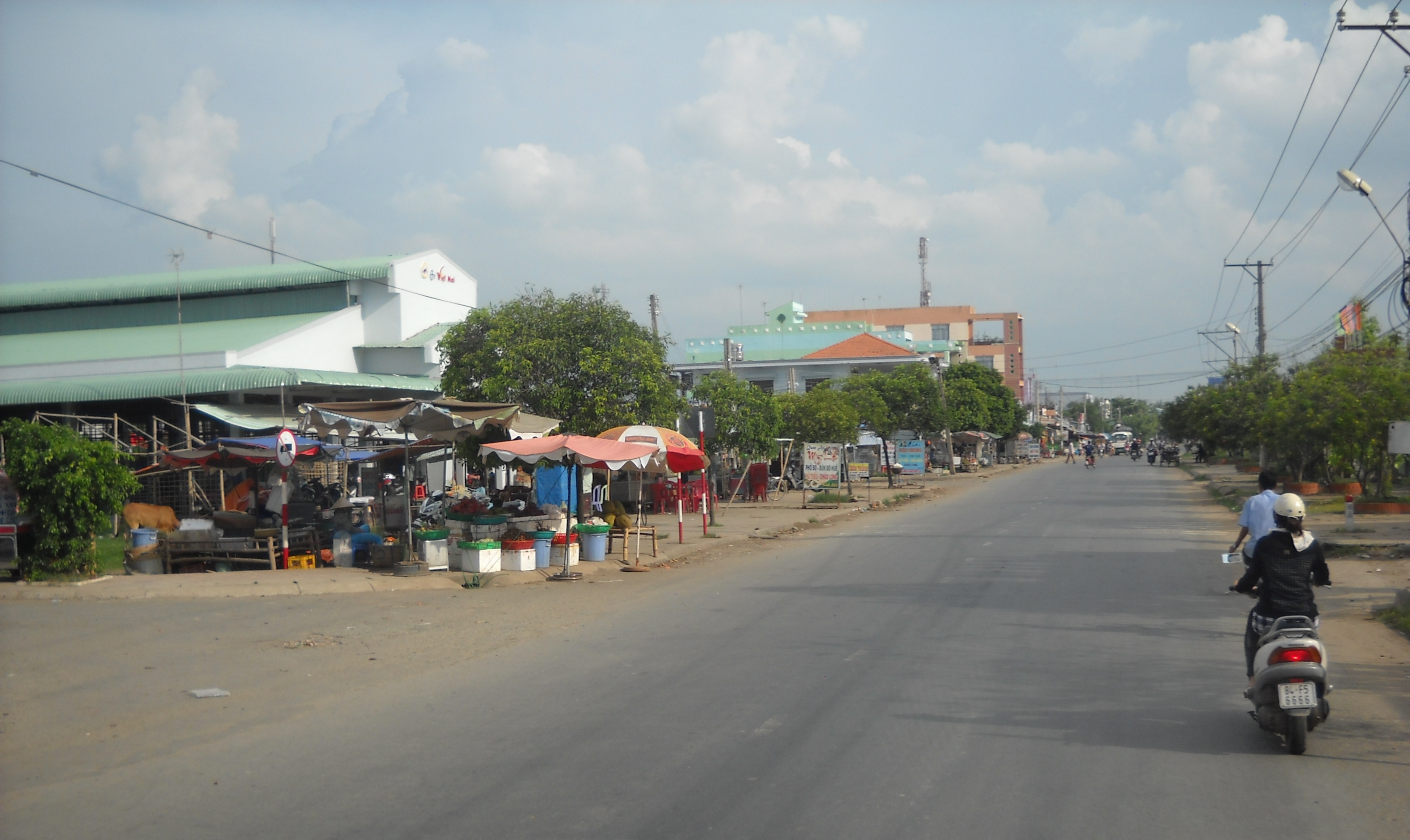 Thị trấn Càng Long, Trà Vinh